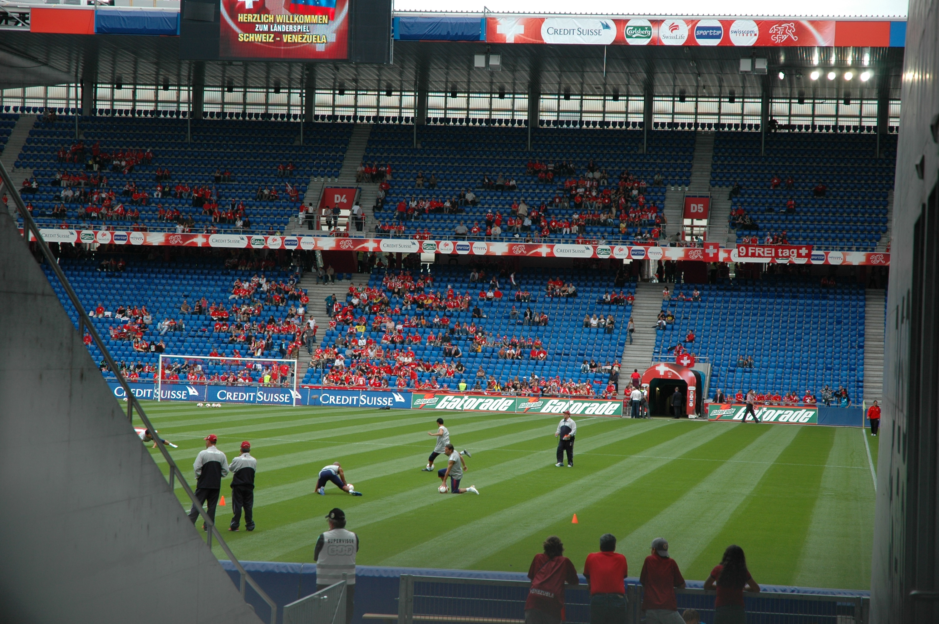 Das Basler Stadion (St. Jakob Park) Innen